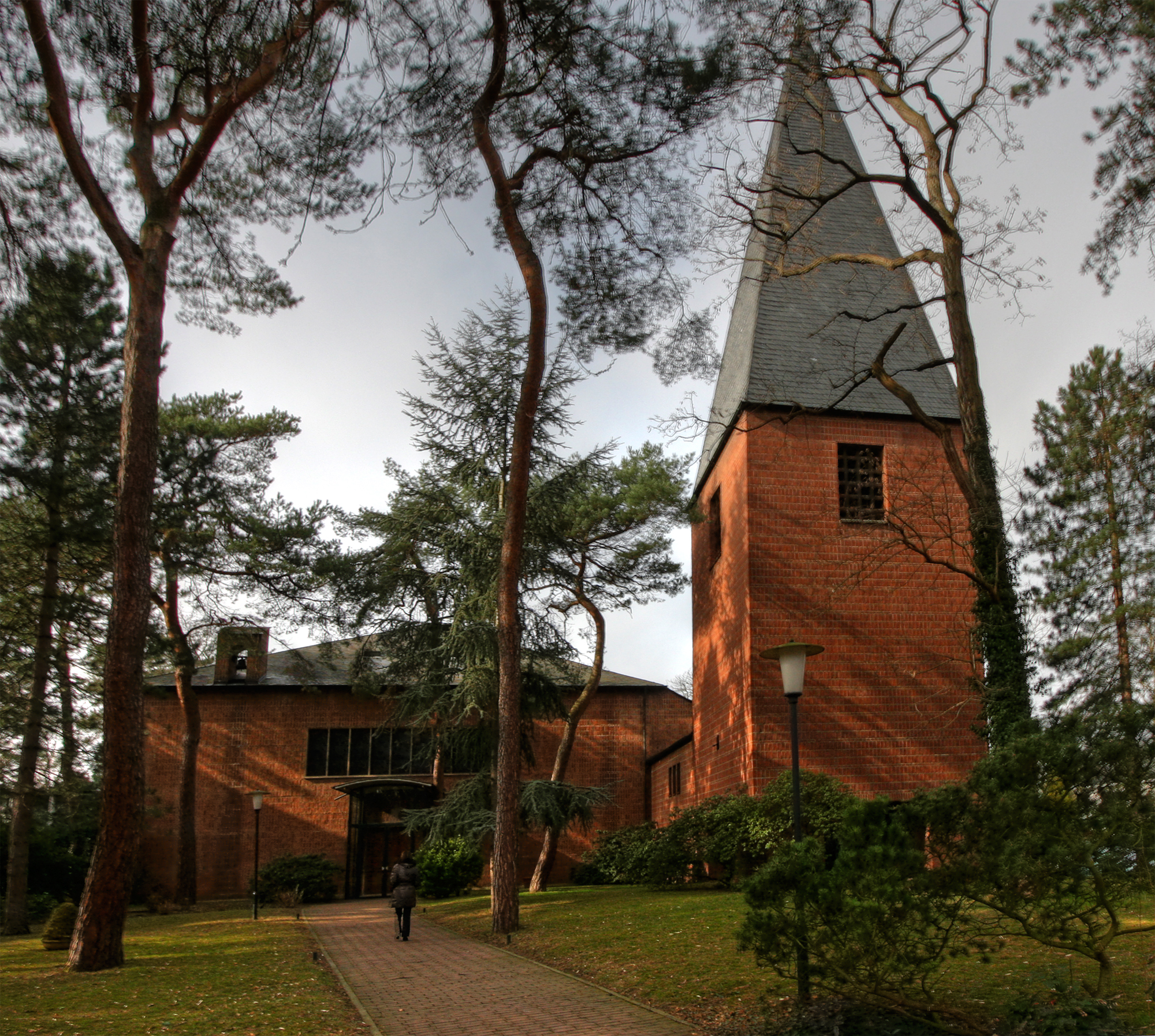 Kirche St. Maria Königin. Architekt Kirche: Dominikus Böhm, Turm: Gottfried Böhm